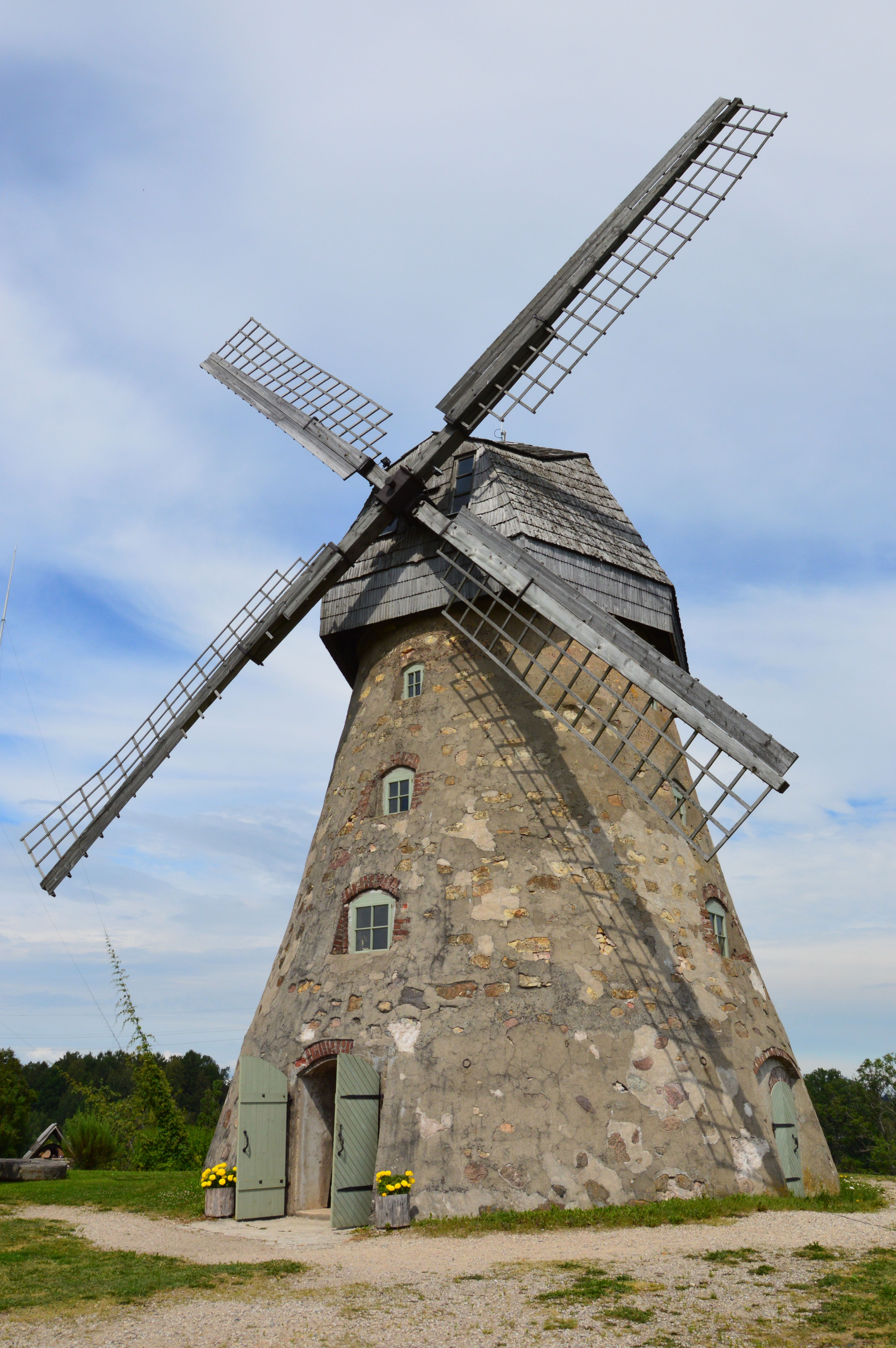 Vējdzirnavas, Drabešu pagasts